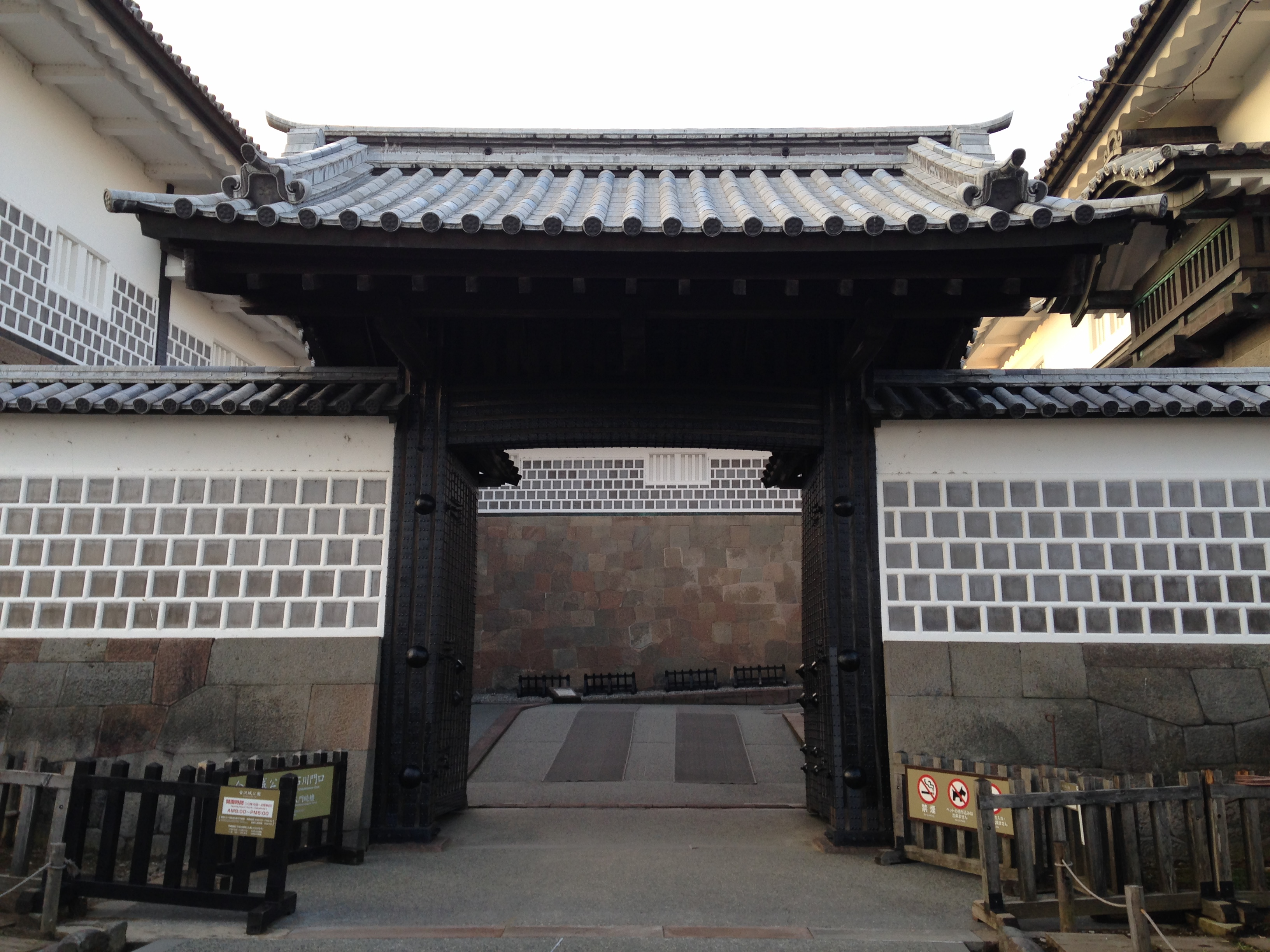 金沢城石川門・一の門